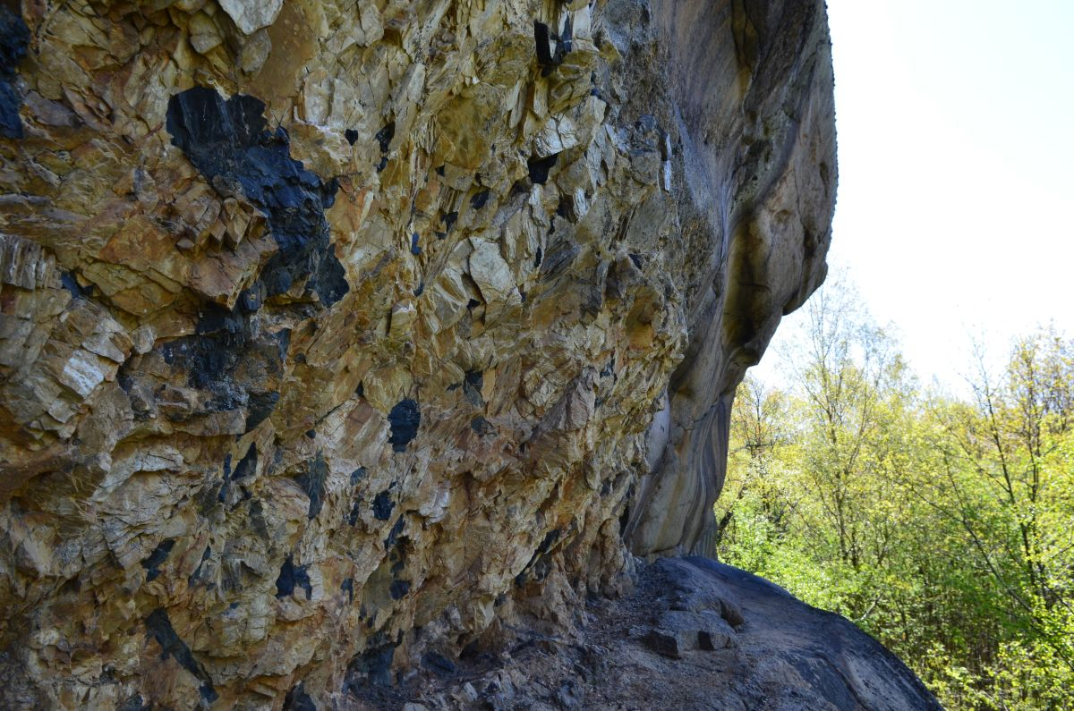 Syenittpegmatittgangen på Vøra.